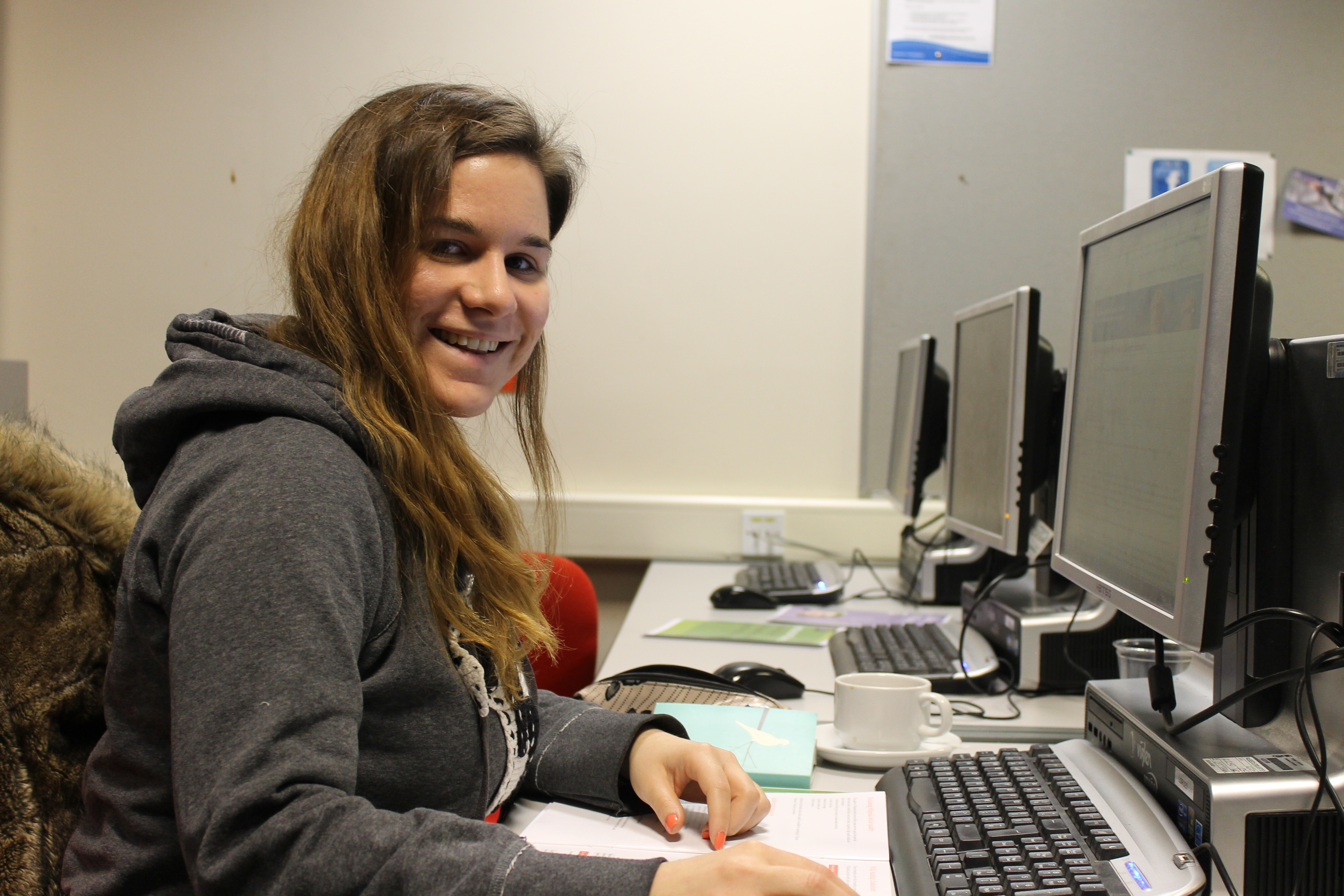 Hacathon ym Mhrifysgol Abertawe, Ionawr 2015.